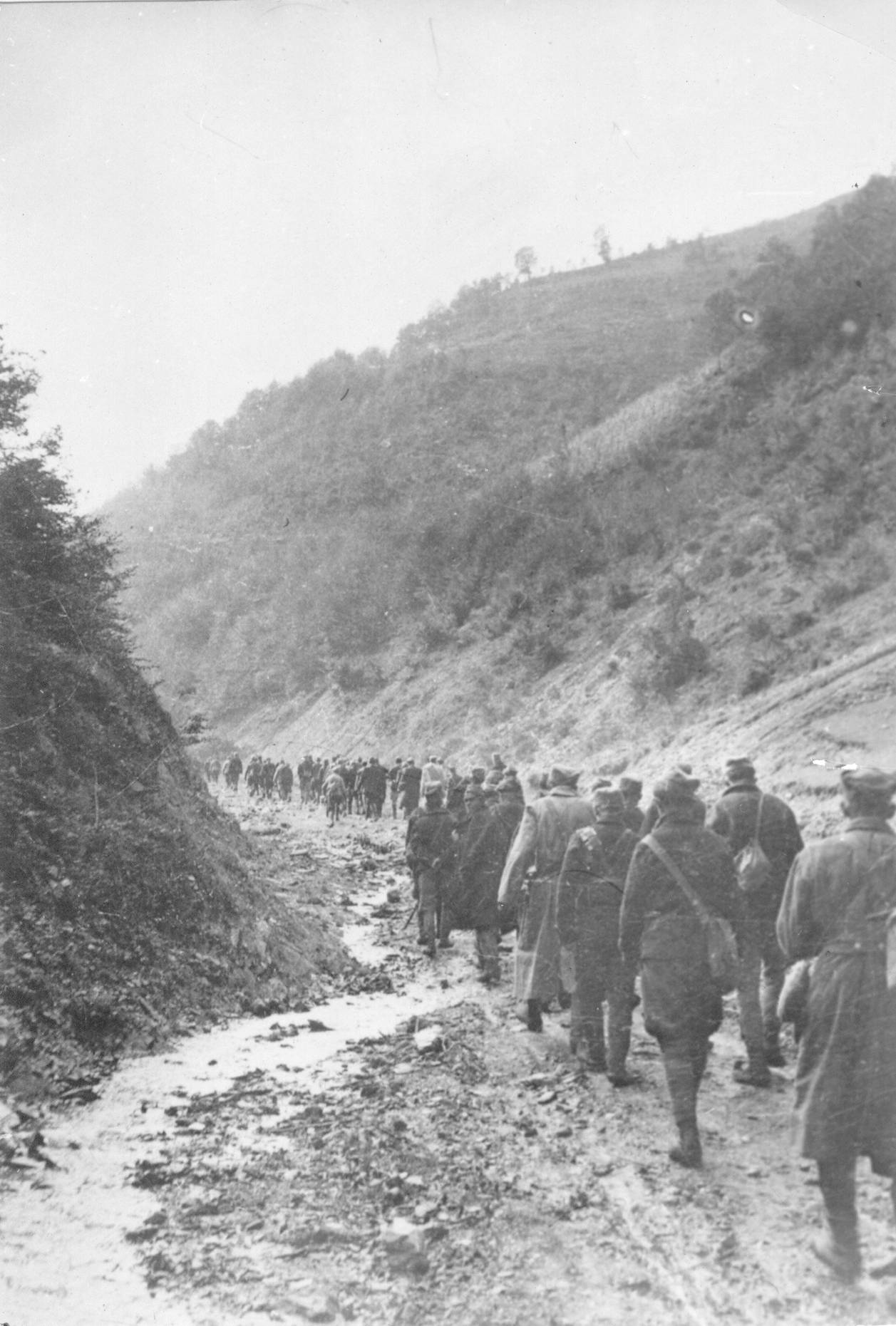 Srpskohrvatski / српскохрватски: Борци Таковског батаљона Чачанског партизанског одреда на путу за Ужице, да би примили оружје из ужичке партизанске фабрике оружја и муниције.